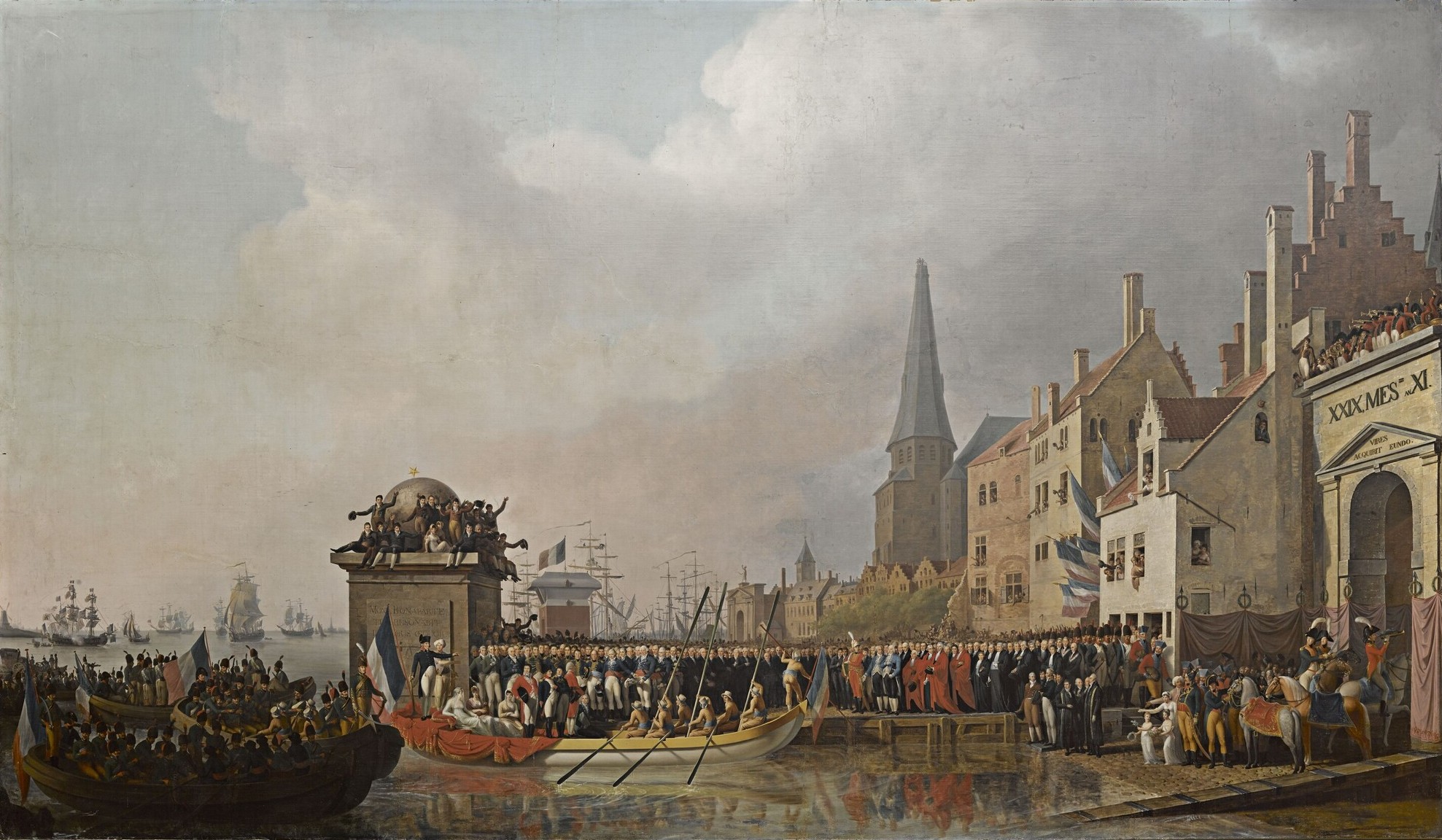 Nom du tableau : Entrée de Bonaparte et de Joséphine à Anvers, 18 juillet 1803. Dimensions : 353 x 611 cm. Matière et technique : huile sur toile.